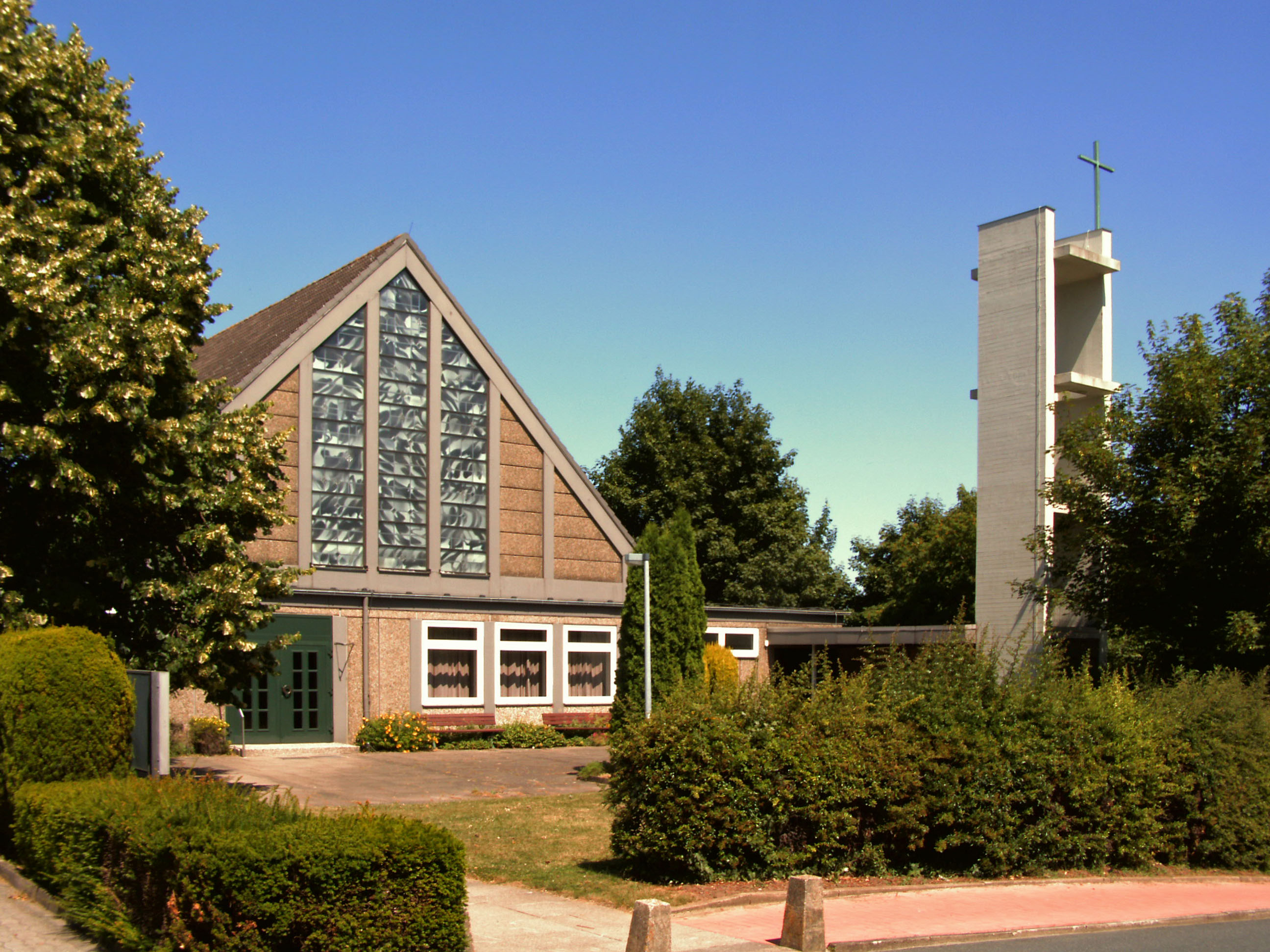 Katholische Kirche St. Thomas Morus in Ronnenberg, Region Hannover